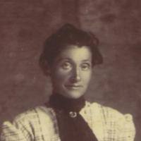 Eugénie Le Brun también conocida como Madame Rushdi (murió el 16 de octubre de 1908) fue una intelectual francesa que inició el feminismo en Egipto, una influyente anfitriona de salones literarios, y amiga cercana de Huda Sha'arawi.